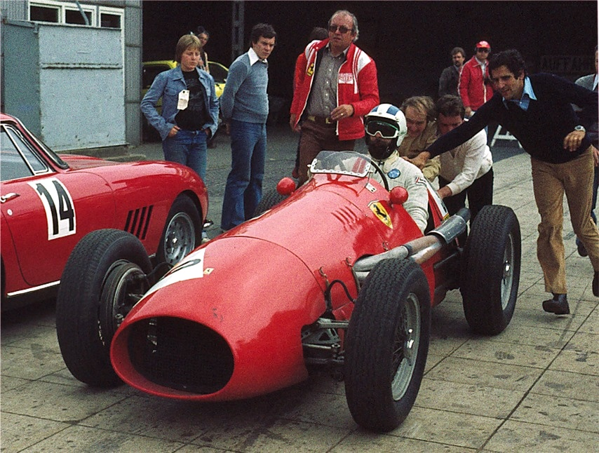 Ferrari 500 bzw. 625 (4-Zylinder-Motor), Baujahr 1952, beim Oldtimer-Grand-Prix des AvD im Fahrerlager des Nürburgrings